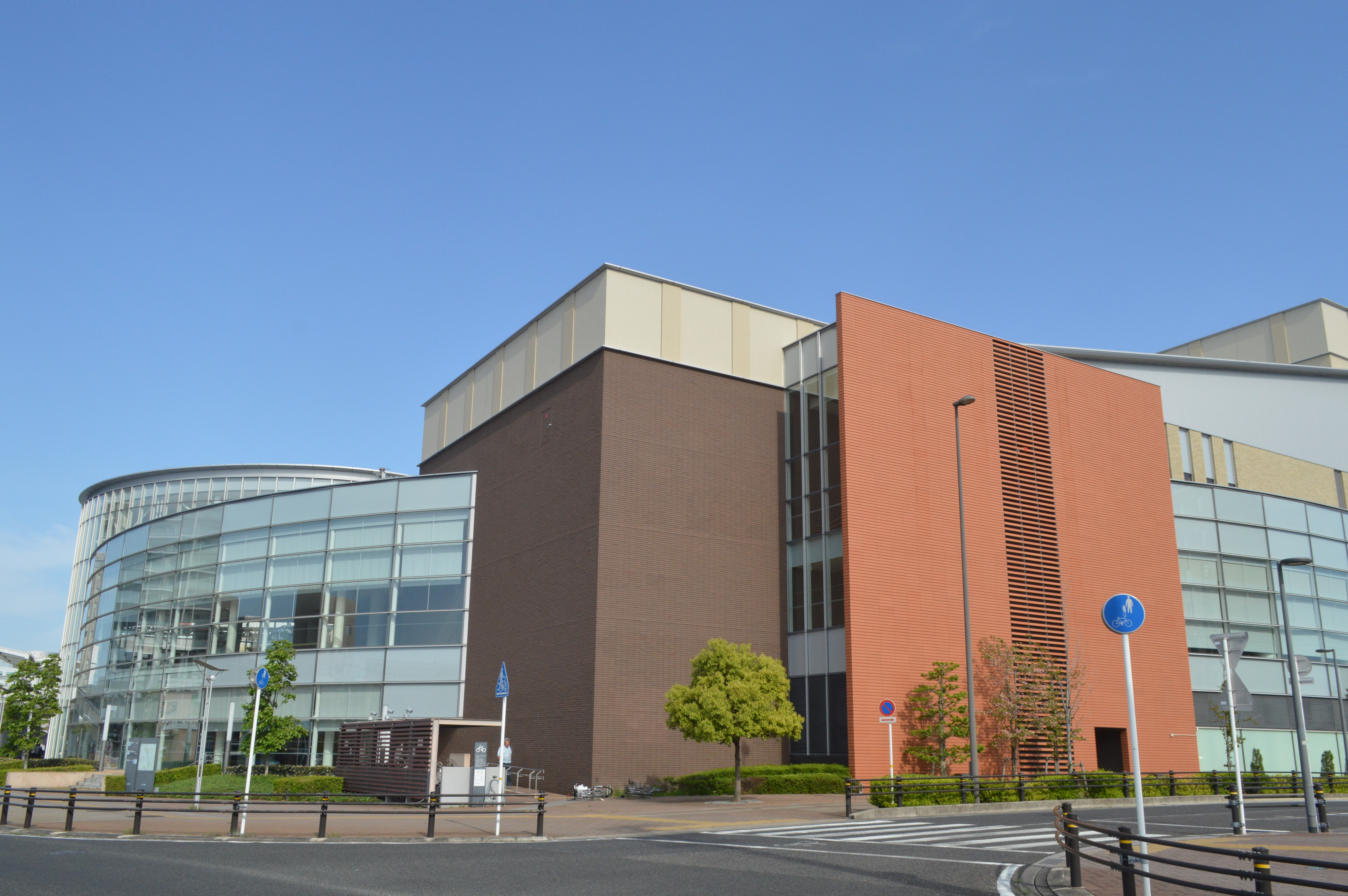 愛知県刈谷市にある複合施設「刈谷市総合文化センター」。愛称は「アイリス」。